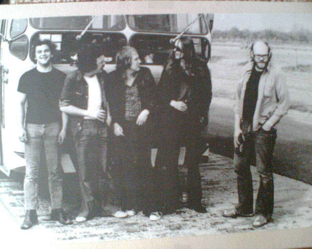 foto van opname door George Legierse vergroot